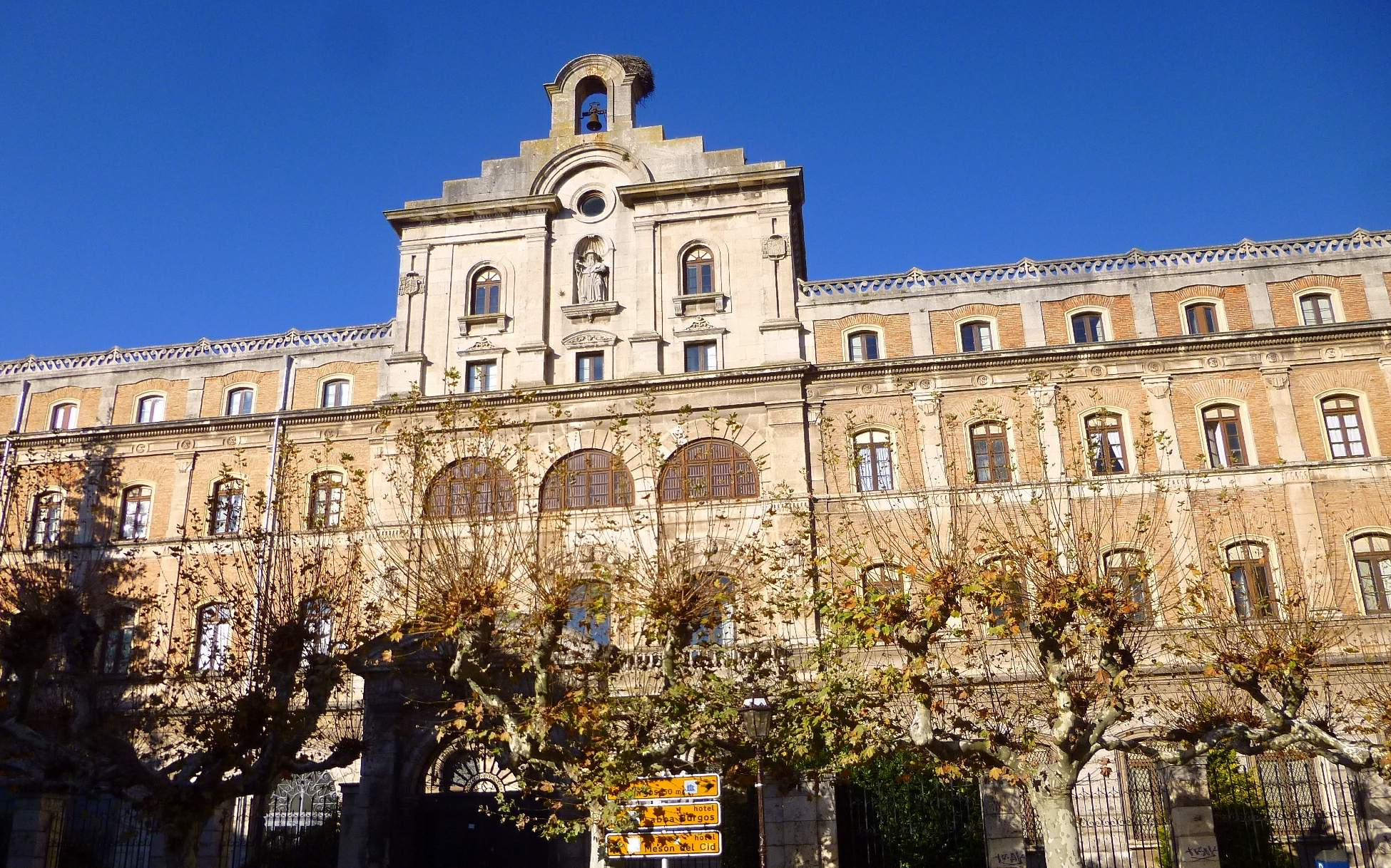 Burgos - Facultad de Teología del Norte de España (Antigua Universidad Pontificia)